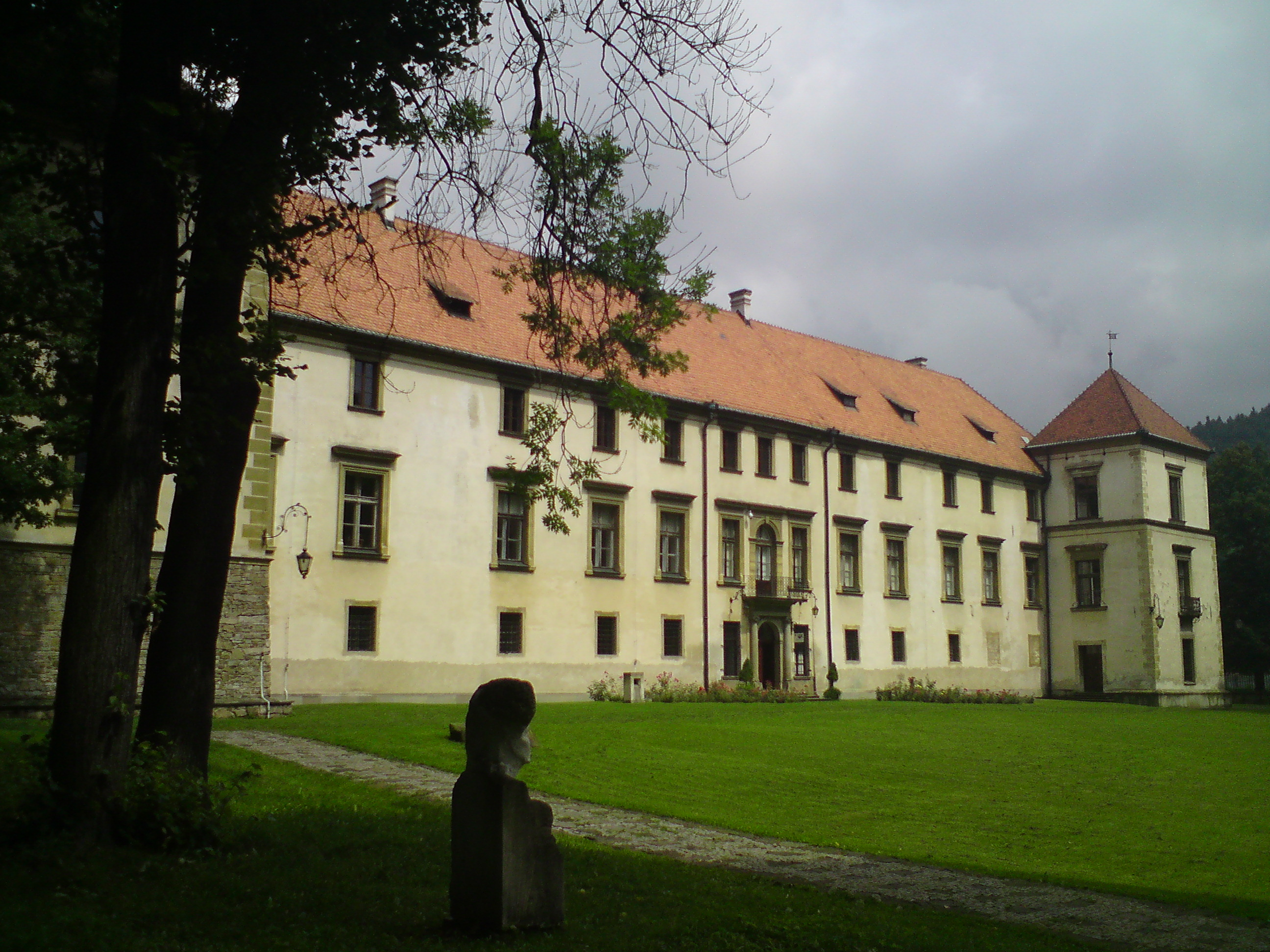 Zamek w Suchej Beskidzkiej